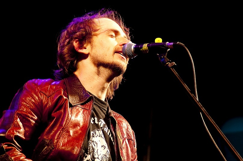 Live 2011